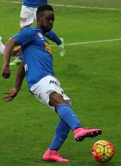 Reagy Ofosu (SV Grödig)